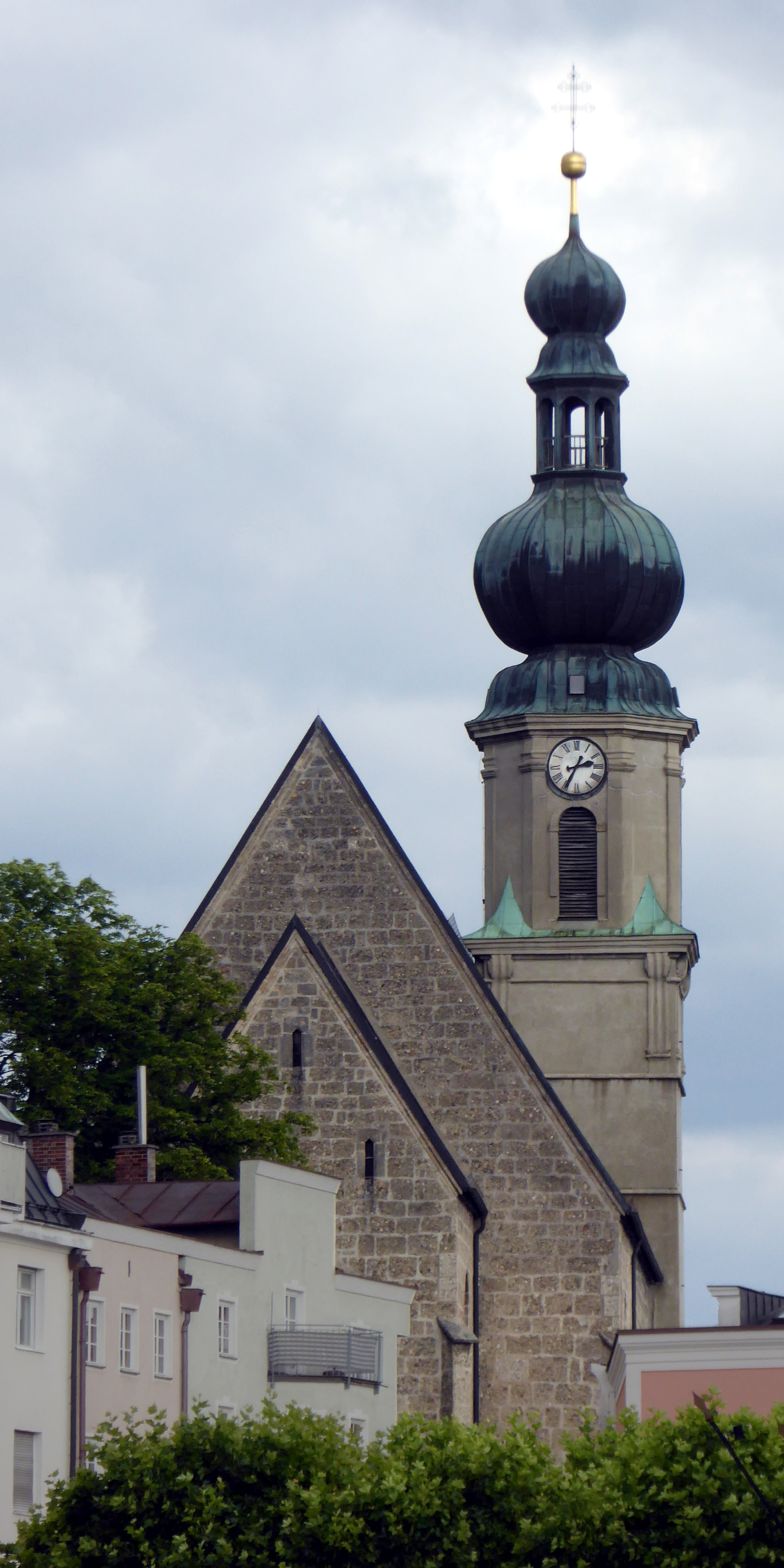 Trostberg, Andreaskirche von Westsüdwesten gesehen.